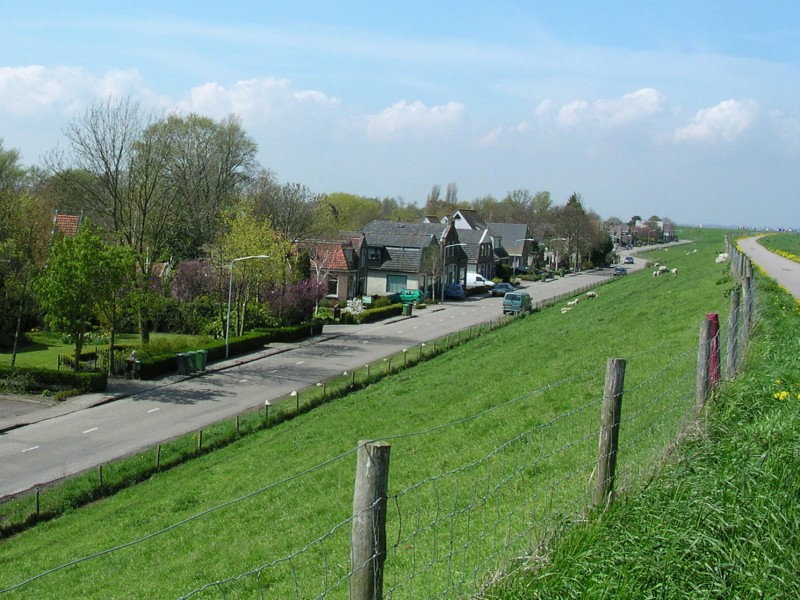 Het dorp Andijk onder aan de Westfriese Omringdijk The village Andijk at the Westfriese Omringdijk